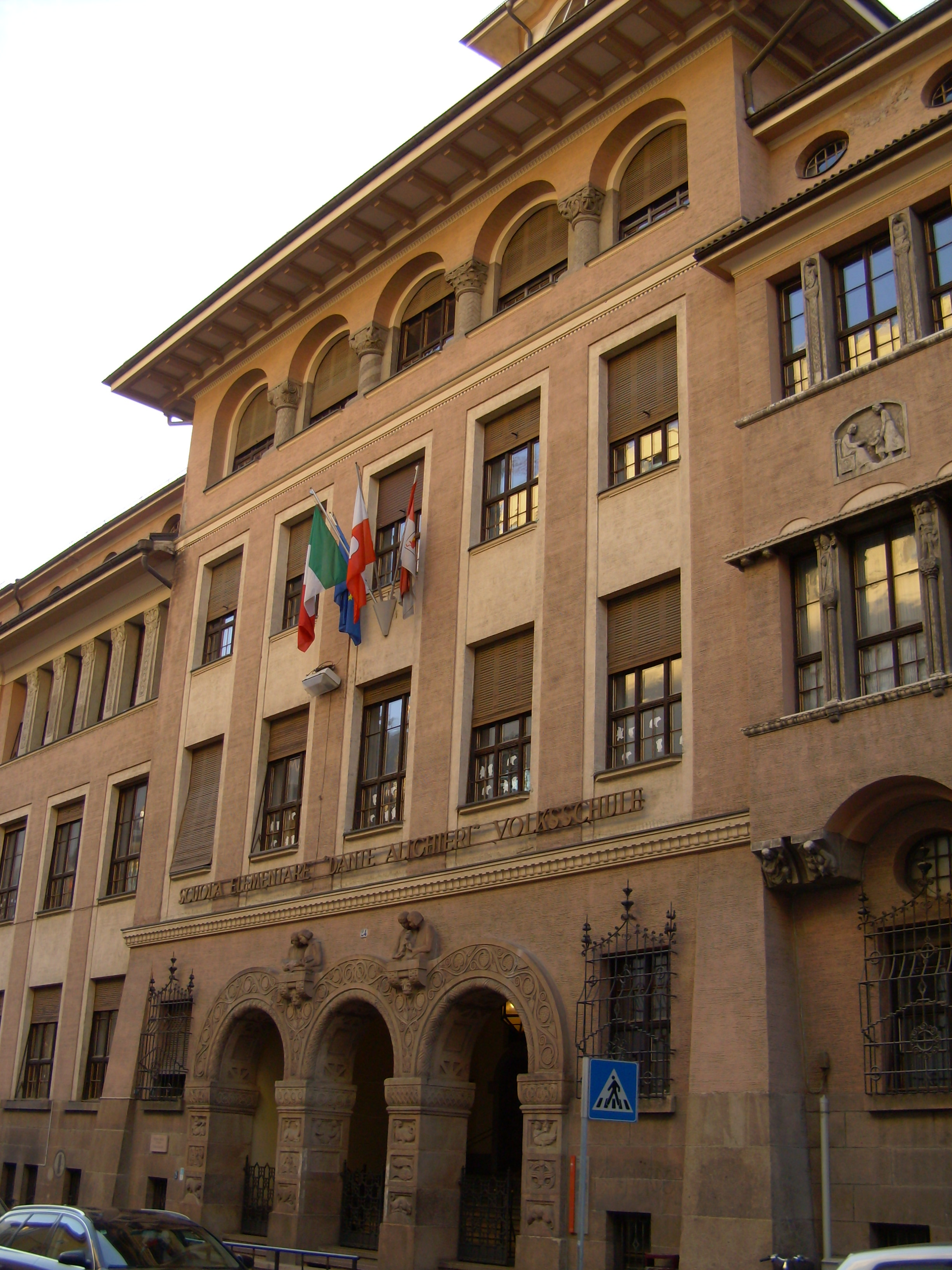 Museo della scuola e scuola elementare "Dante Alighieri" di Bolzano - Schulmuseum und Volksschule "Dante Alighieri" in Bozen - School Museum and primary school "Dante Alighieri" in Bolzano-Bozen